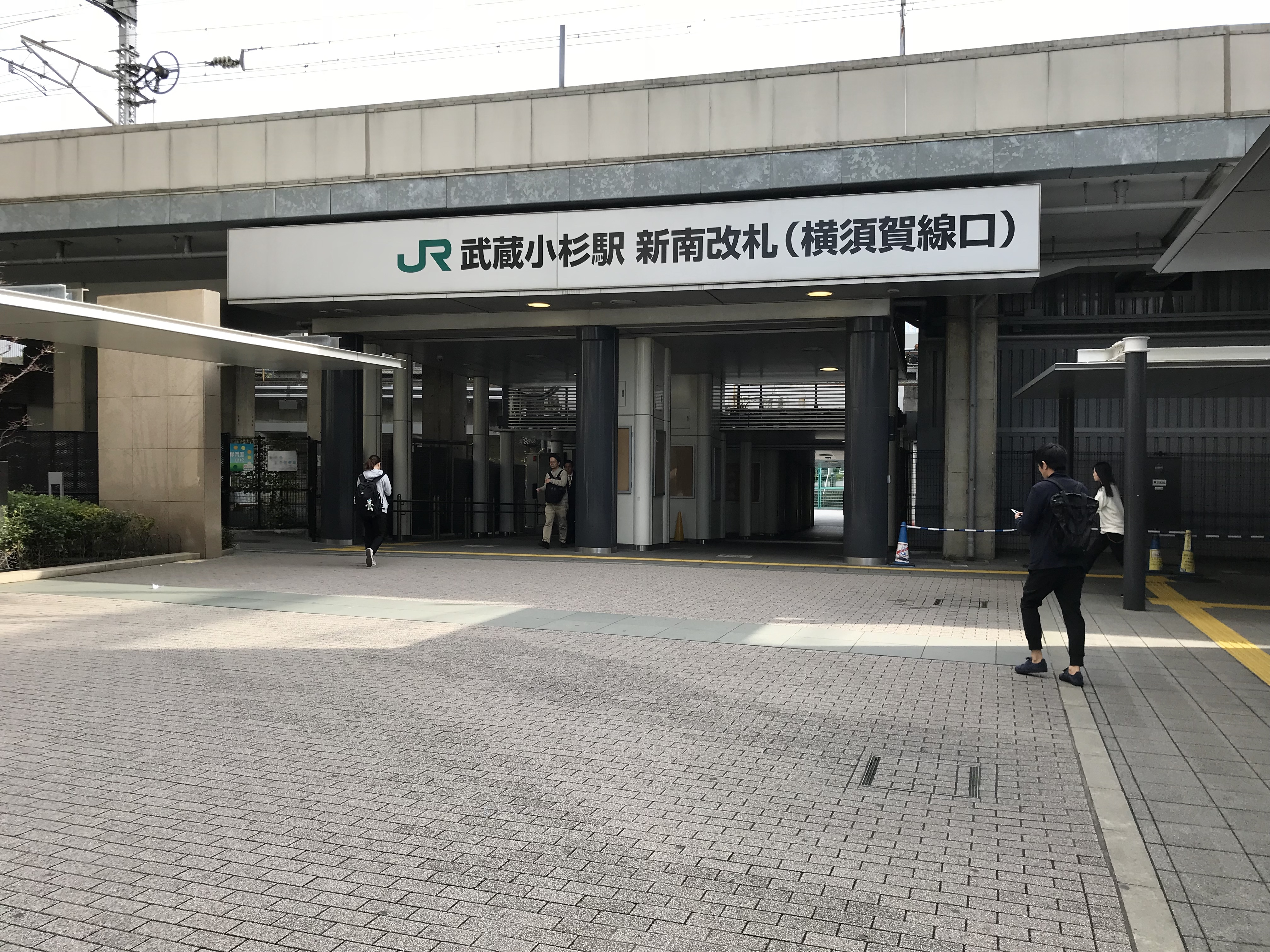 JR東日本横須賀線武蔵小杉駅横須賀線口